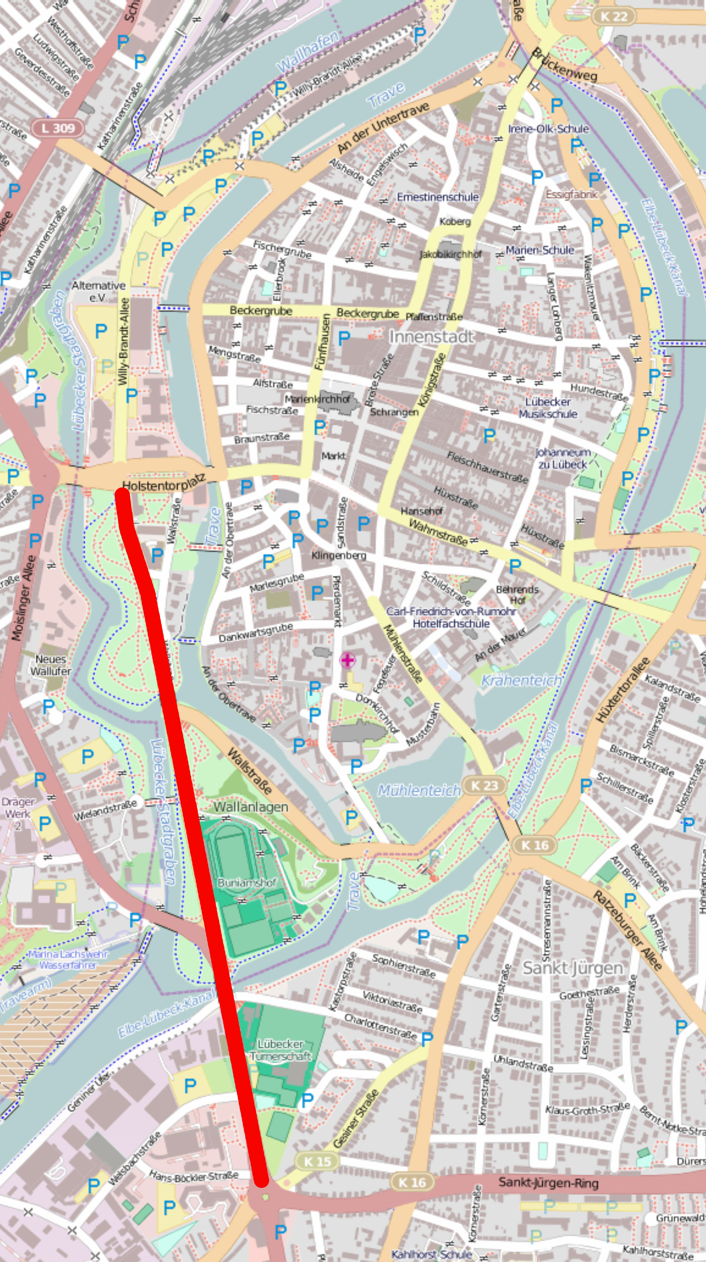 Der Verlauf der Possehlstraße in Lübeck, rot markiert auf einer OpenStreetMap-Karte